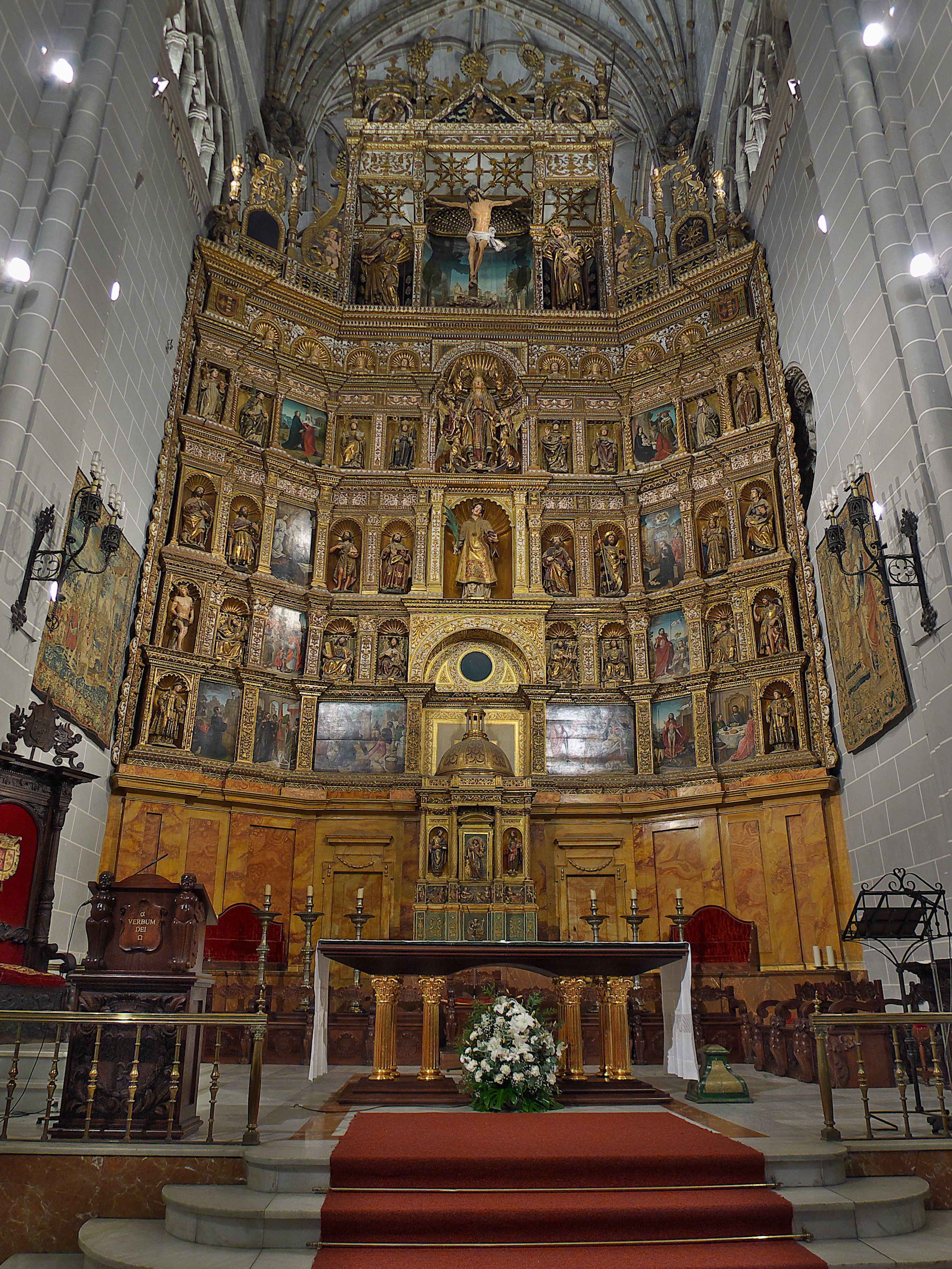 Diego de Deza, Obispo de Palencia (1499-1505), contrata con Pedro de Guadalupe (1504) el retablo para la Capilla Mayor catedralicia, hoy Capilla del Sagrario de la catedral de Palencia. Juan Rodríguez de Fonseca, Obispo de Palencia (1505-1514), en su importante replanteamiento de la catedral, lo adapta, ampliándolo, a la nueva capilla mayor. En el 1609 se finaliza una obra muy valorada en la retablística plateresca.